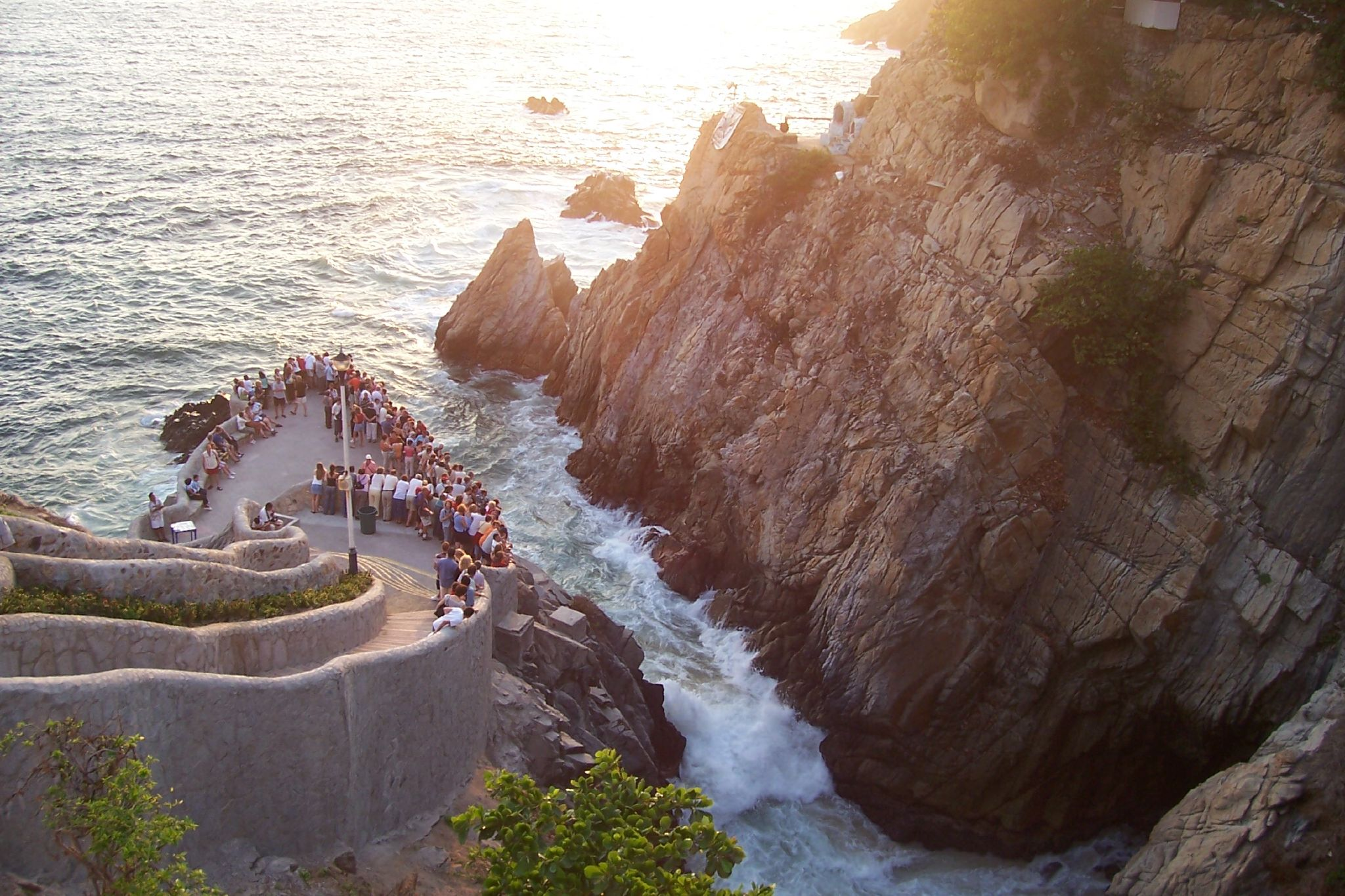 La Quebrada en Acapulco, Guerrero, México.